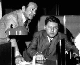 Italian actors Gianni Agus and Paolo Villaggio